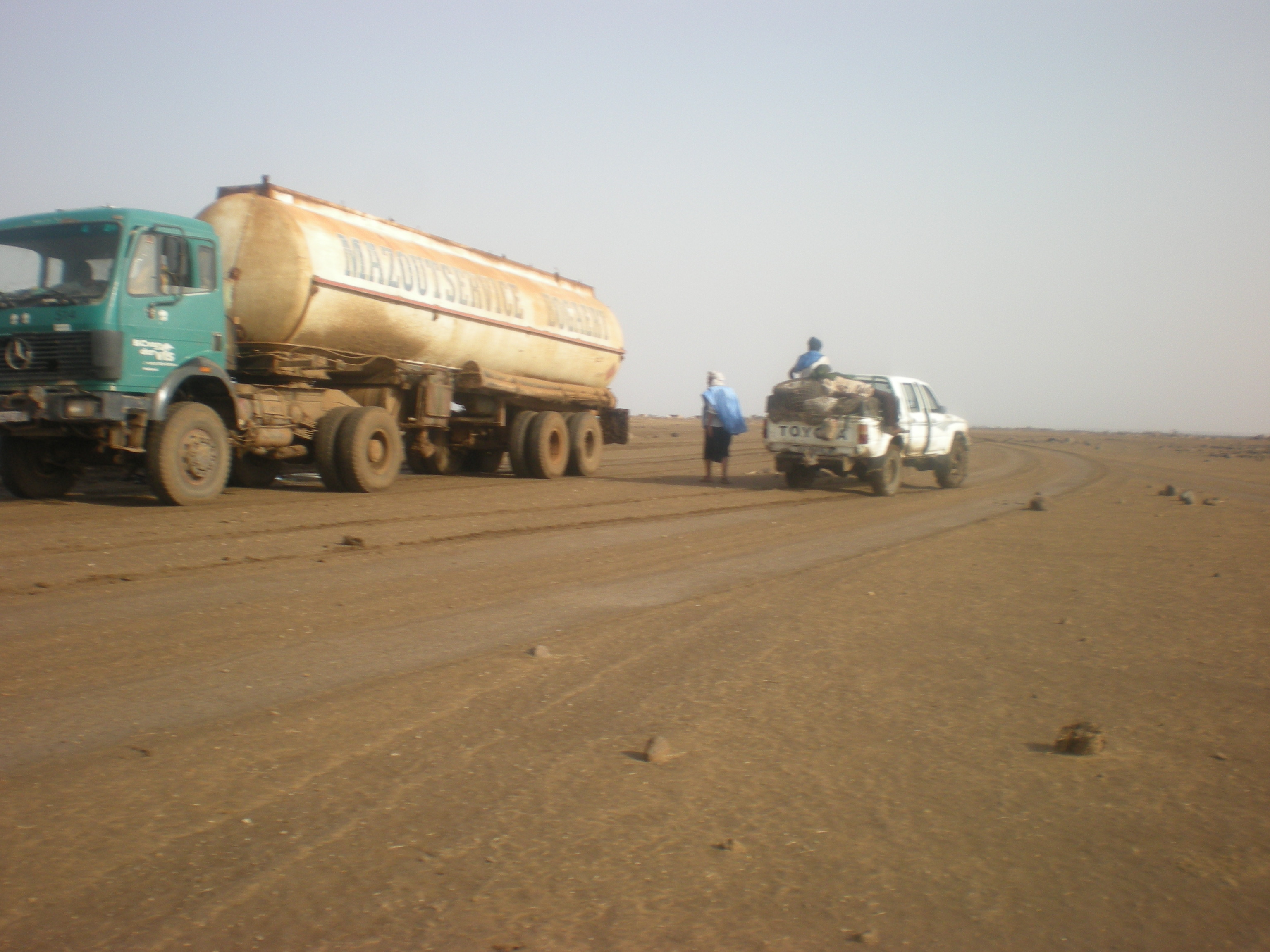 [Jemal Oumar] Traders traversing the Sahel-Saharan region are feeling the impact of recent AQIM activity. التجار العابرون لمنطقة الساحل الصحراء يلمسون آثار النشاط الأخير للقاعدة بالمغرب الإسلامي Les commerçants qui parcourent la région du Sahel-Sahara ressentent l'impact de la récente activité d'AQMI.